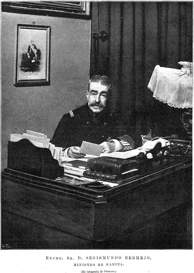 Retrato de Segismundo Bermejo y Merelo, de una fotografía de Christian Franzen, grabado de Laporta, recogido en la revista española La Ilustración Española y Americana.